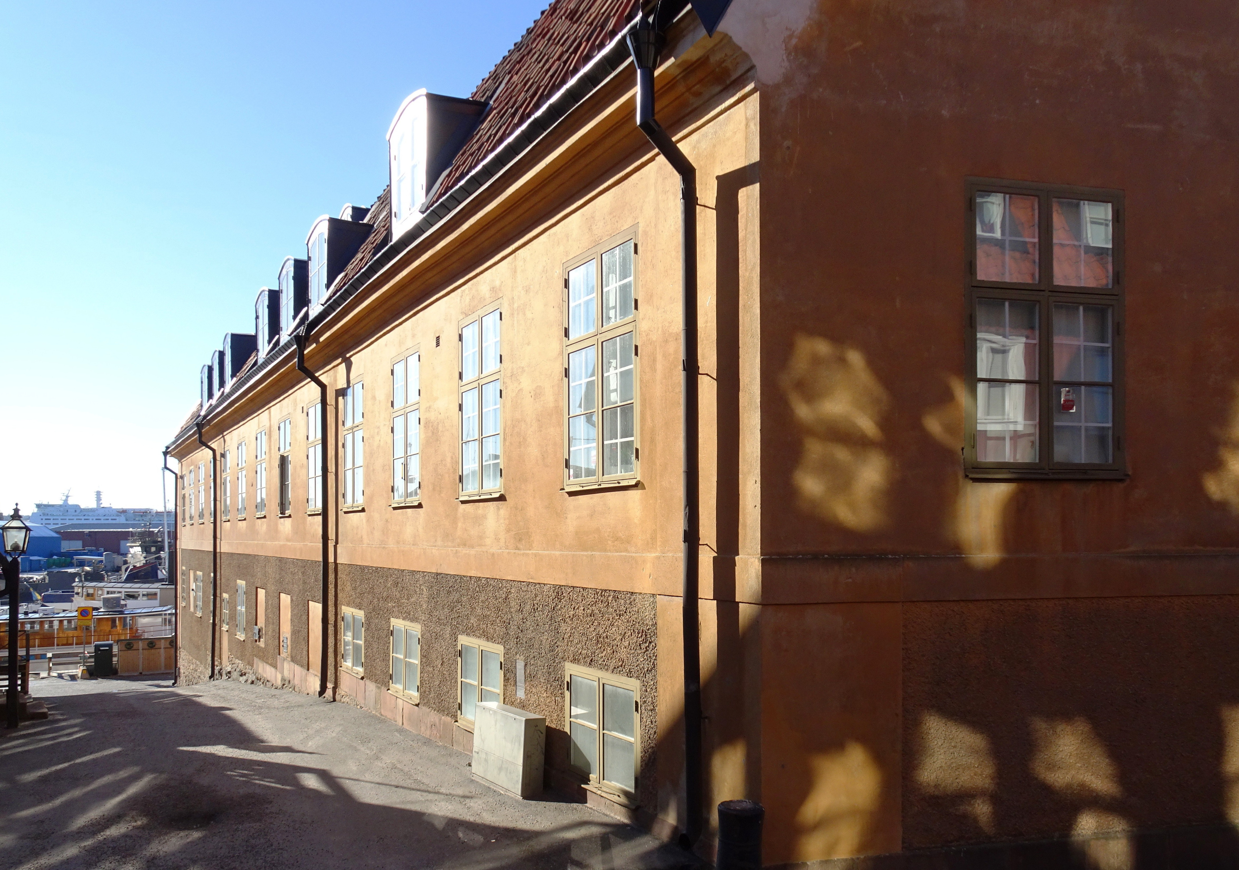 Fastigheten Djurgården 1:35, Djurgårdsstaden, byggd för Djurgårdsvarvet som varvskontor och bostäder 1769. Ritad av Fredrik Henrik af Chapman.